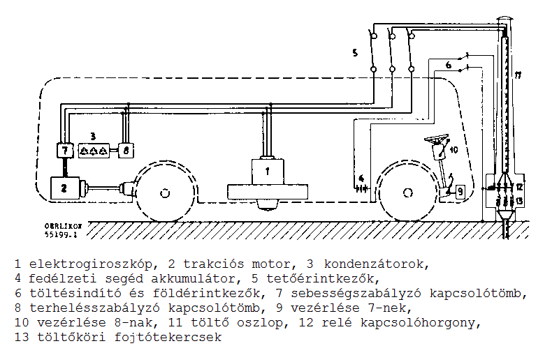 A kis és nagyfeszültésű fedélzeti hálózat, valamint a töltőoszlop áramkörei